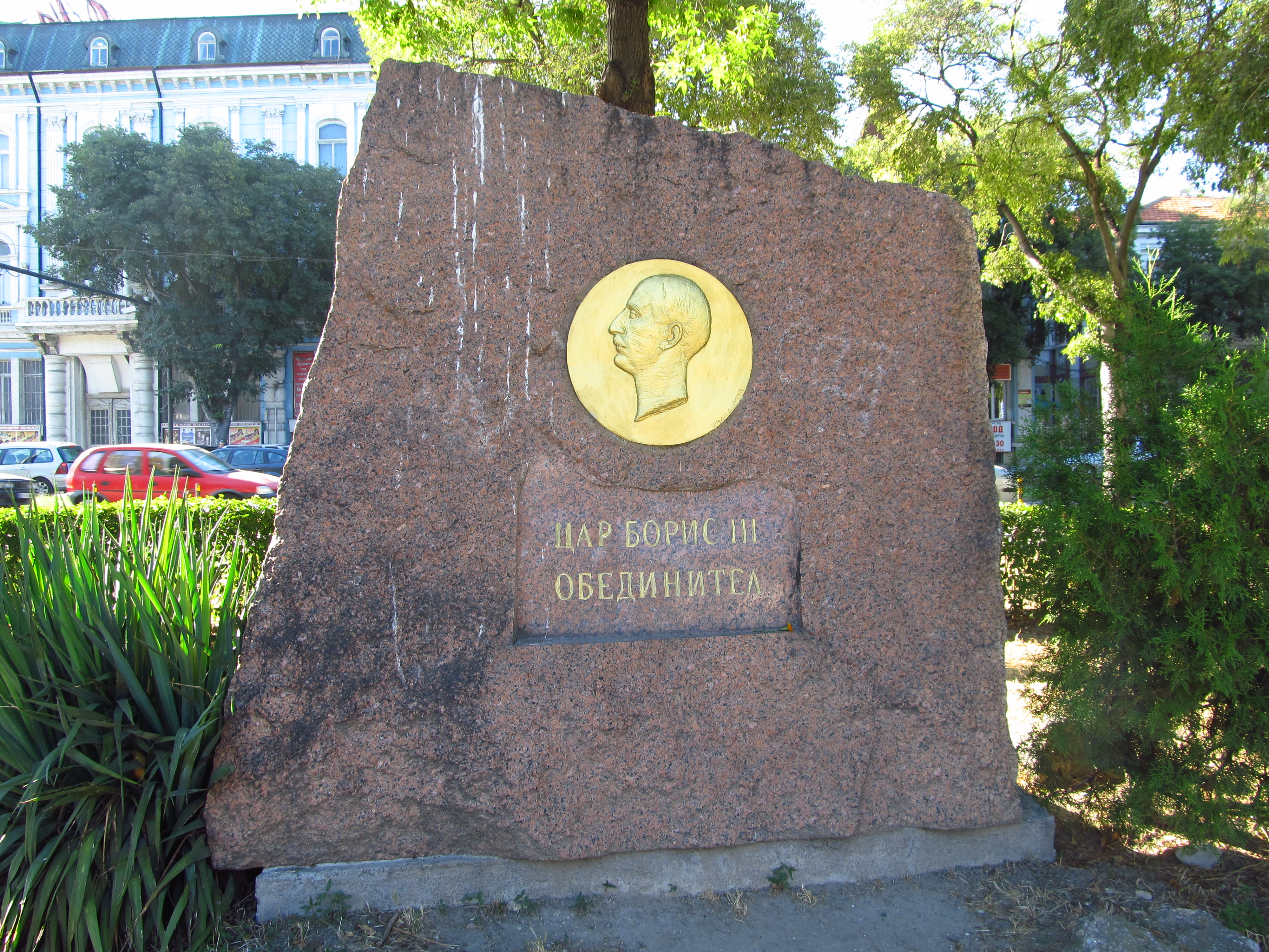 Памятный знак болгарскому царю Борису III в Варне